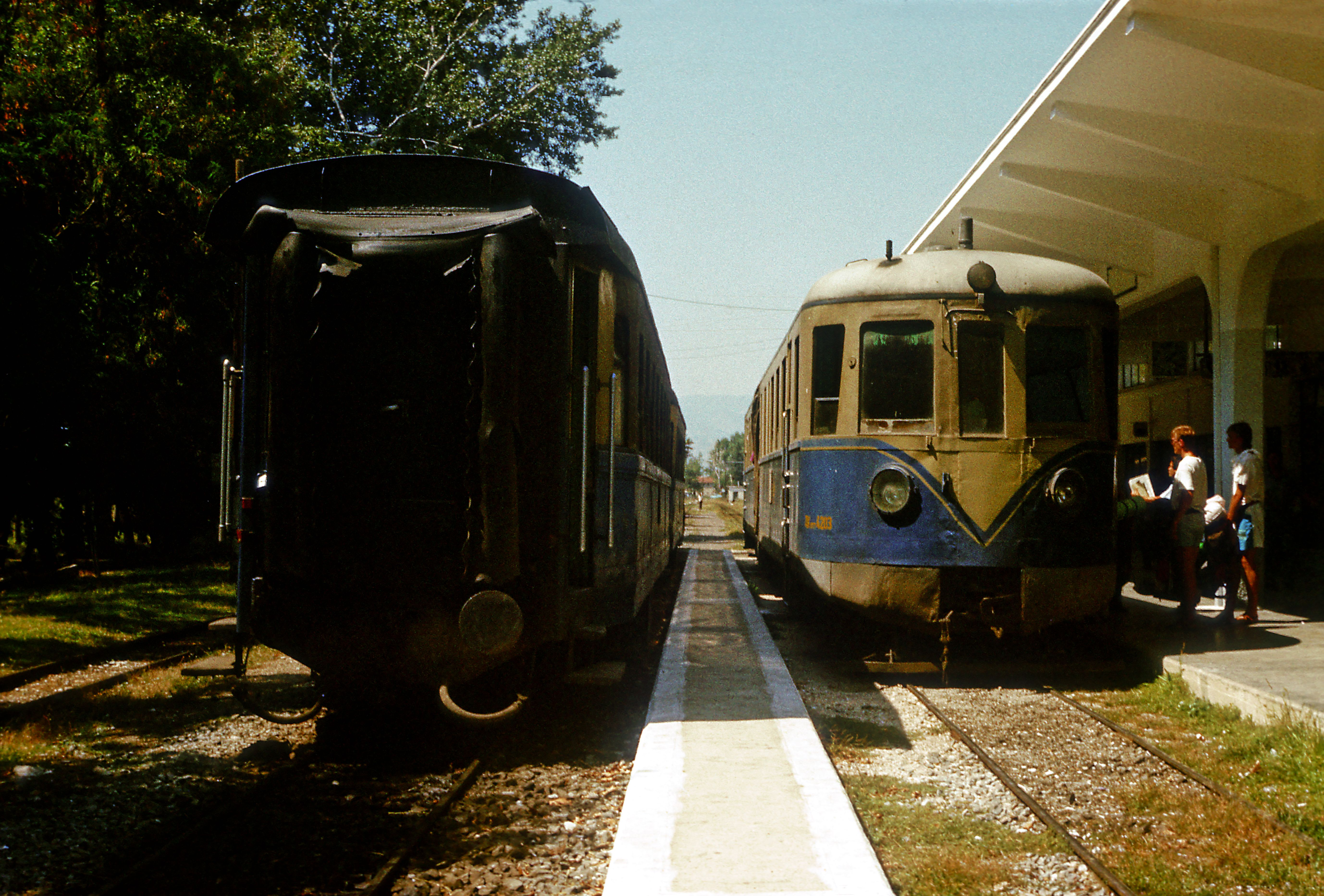 Paleofarsalos–Kalambaka, Wagenzugwechsel in Karditsa. Unerwartet endet die Fahrt des Triebwagens, der Wagenzug links ist die Ersatzgarnitur.